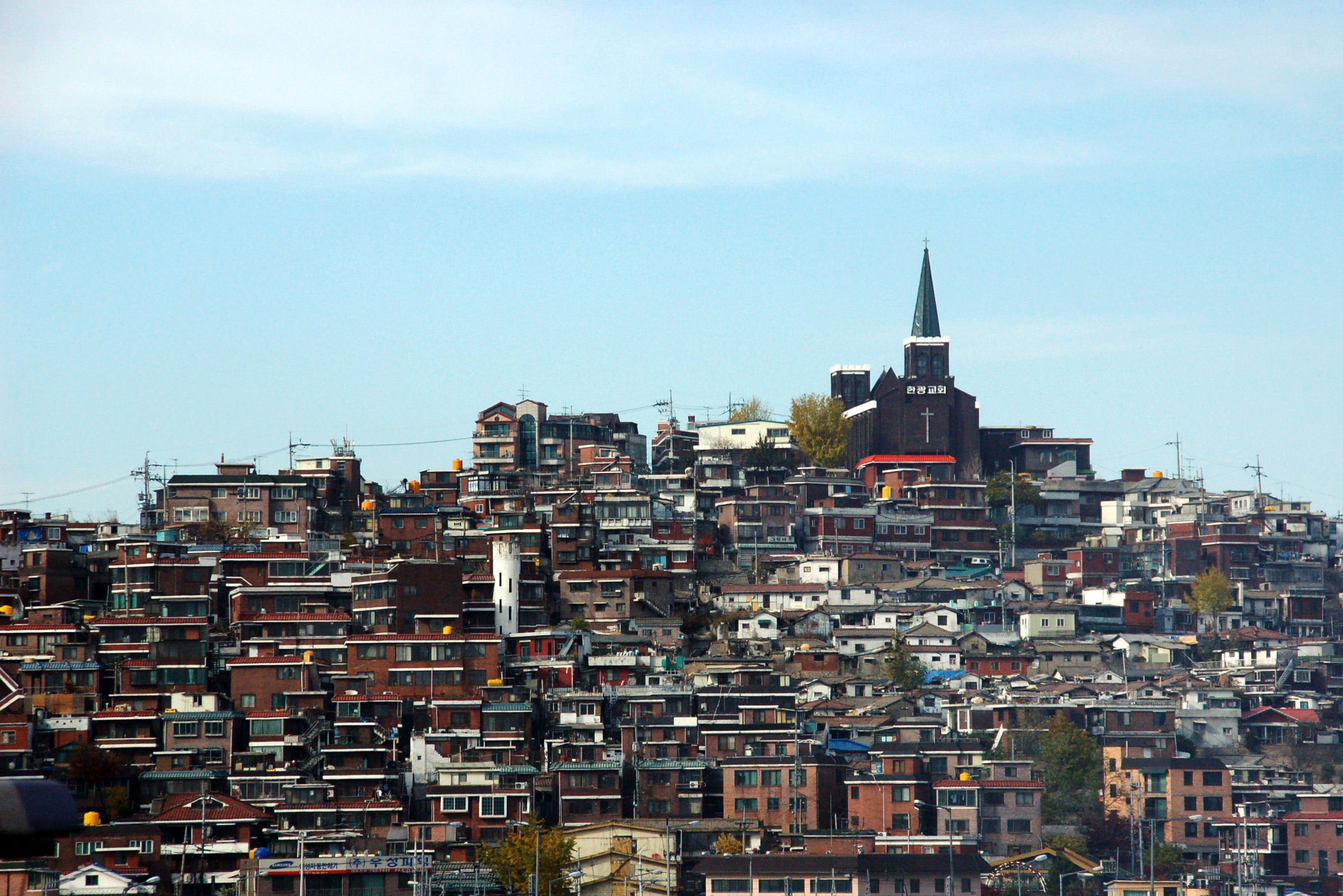 Yongsan-gu, Seoul, Korea.